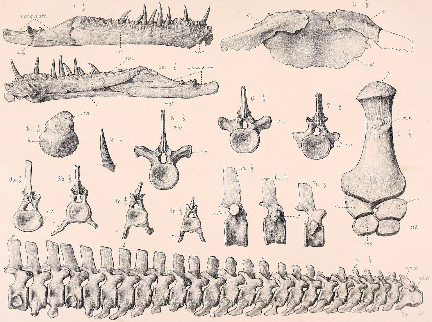 Tricleidus seeleyi.